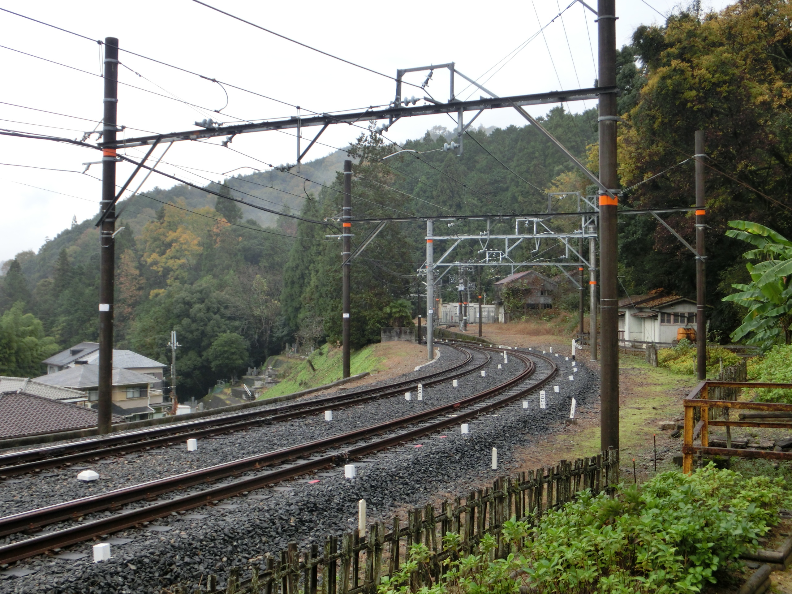 下古沢駅難波方